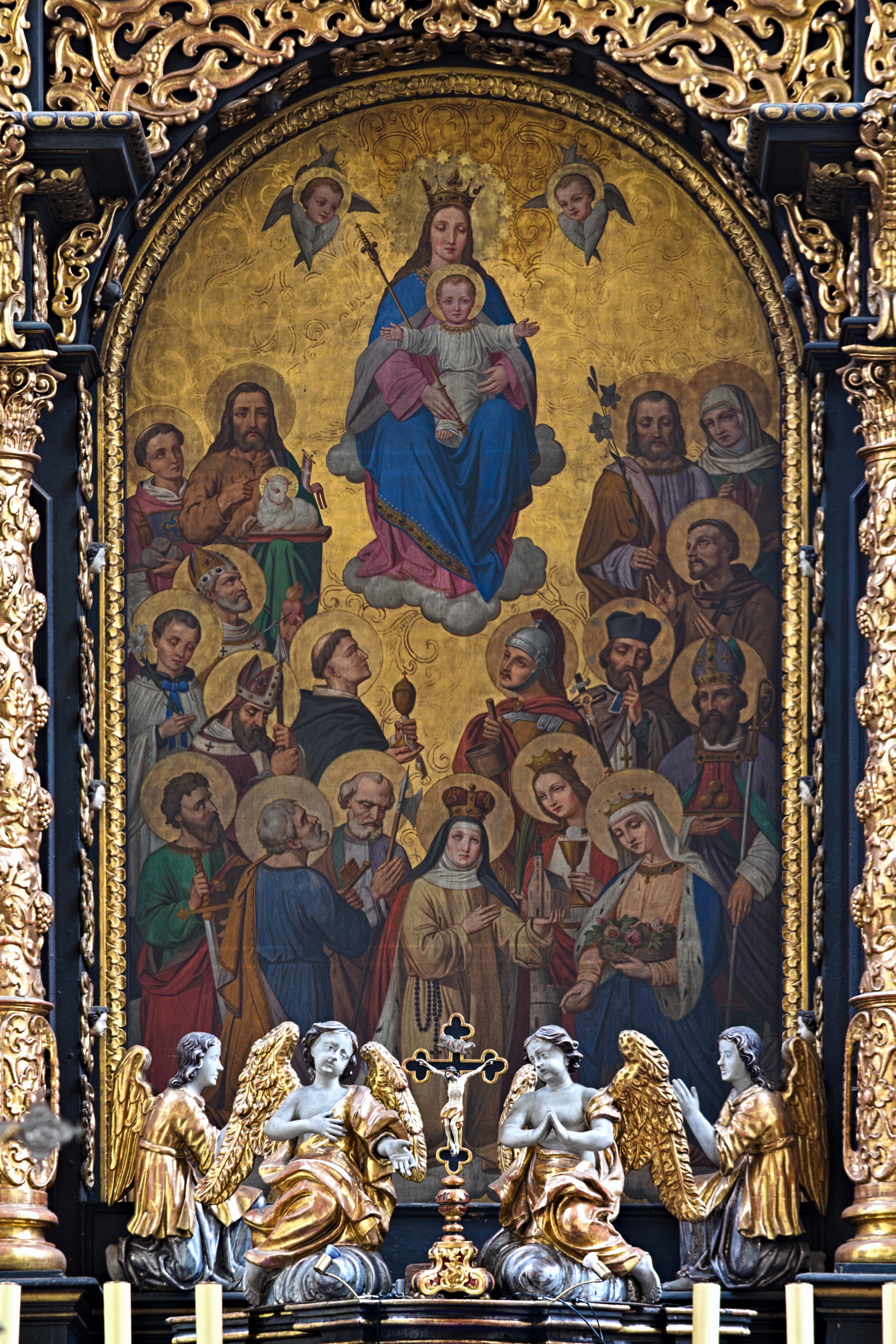 obraz Matki Bożej wśród świętych z ołtarza głównego kościoła Wszystkich Świętych w Gliwicach autorstwa Ferdinanda Wintera z 1879 roku